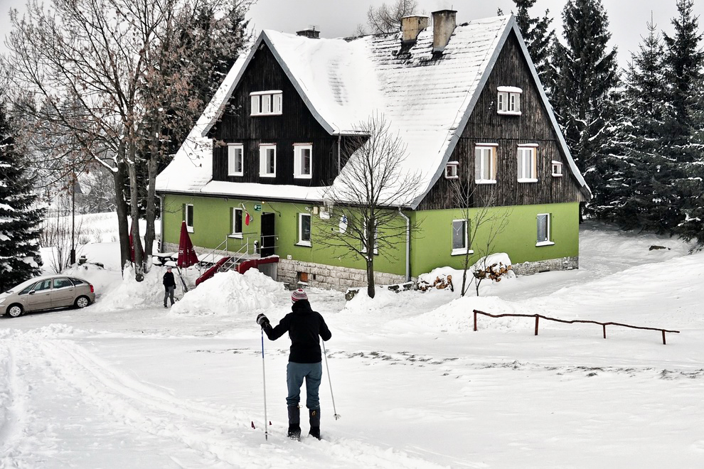 Schronisko PTTK w Pasterce w Górach Stołowych w zimowej szacie